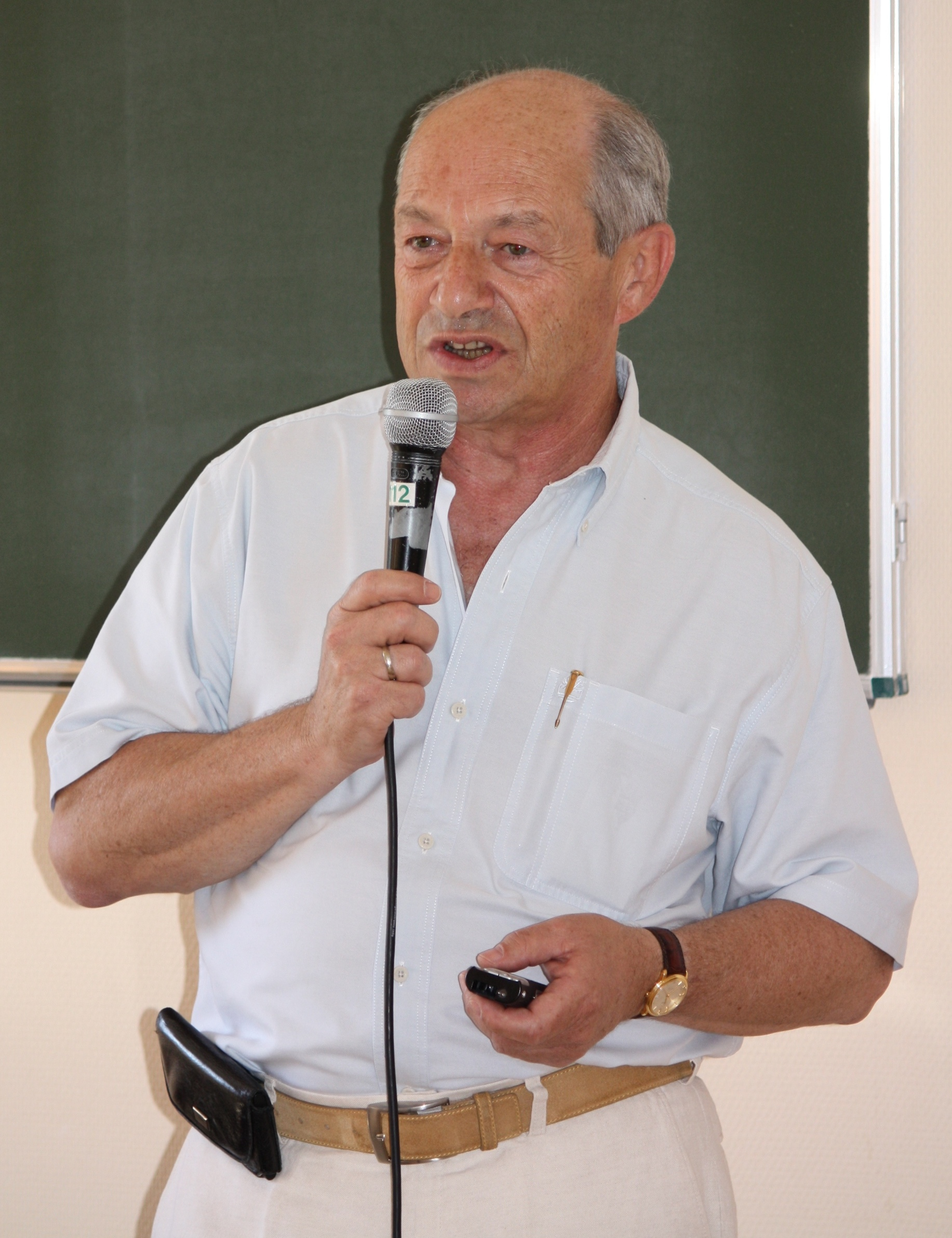 Henryk Orfinger podczas wykładu otwartego w Wyższej Szkole Finansów i Zarządzania w Warszawie